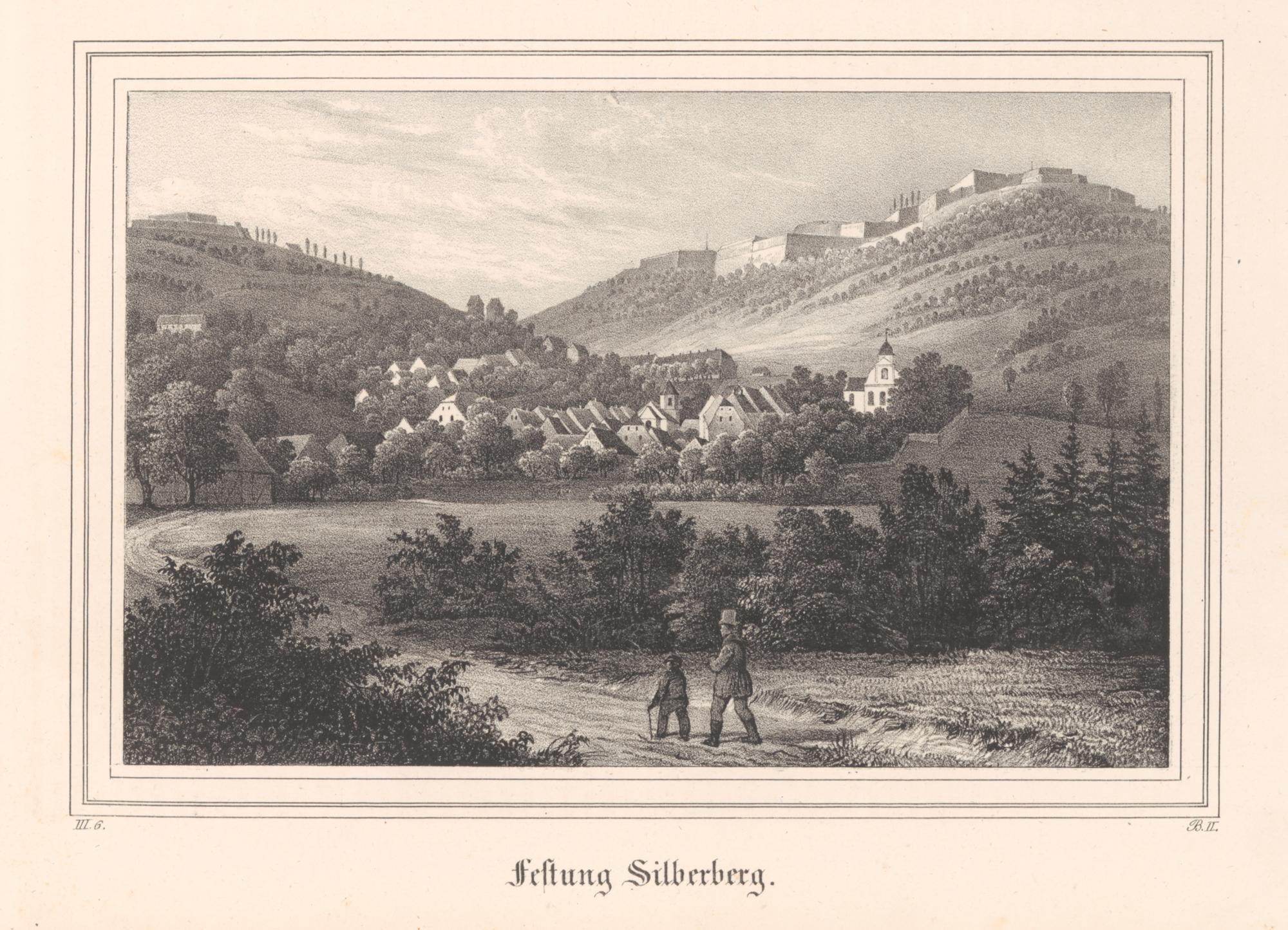 Festung Silberberg, Lithographie : 18 x 12 cm, Heinrich Wilhelm Teichgräber